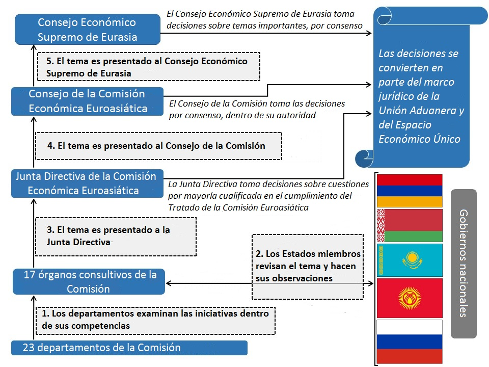 Processo de tomada de decisões da União Aduaneira da Eurásia e do Espaço Económico Único